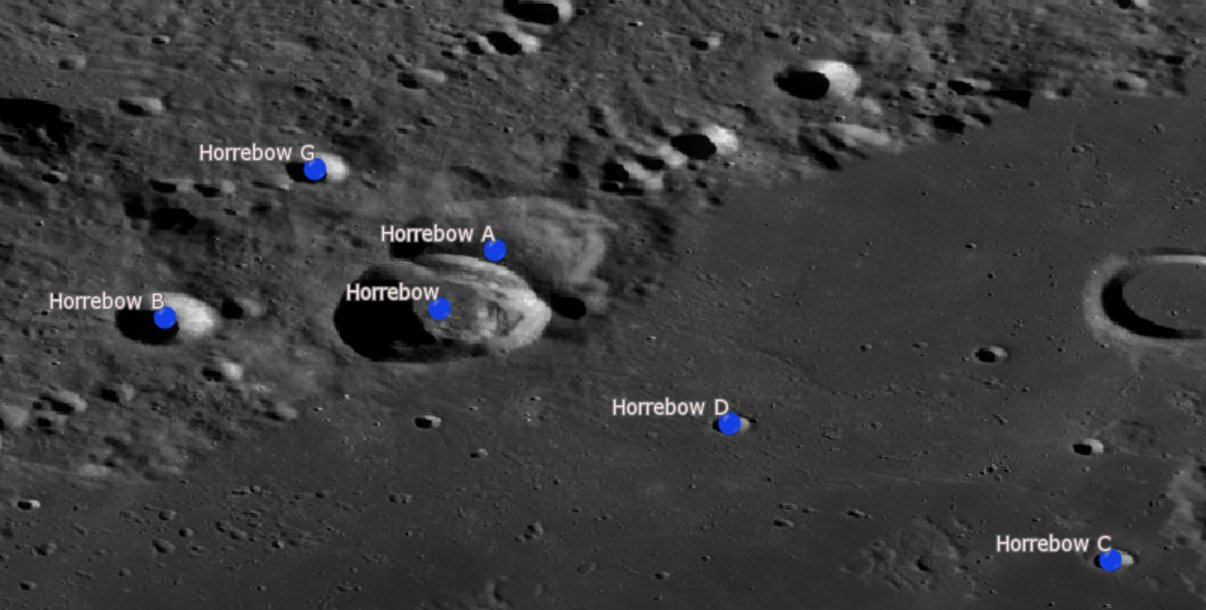 Cráter lunar Horrebow. (Imagen LRO)